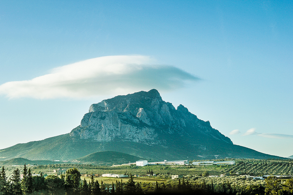 Vue du Jebel Rassas de Tunsie